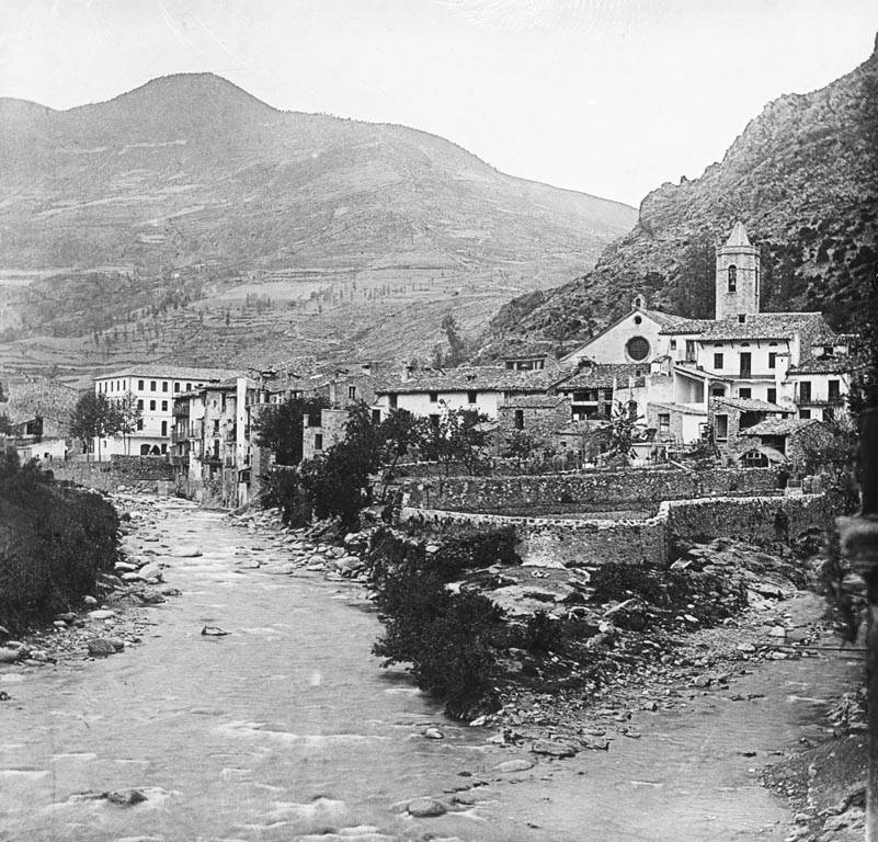 Ribes de Freser. Cèsar August Torras i Ferreri (1907)